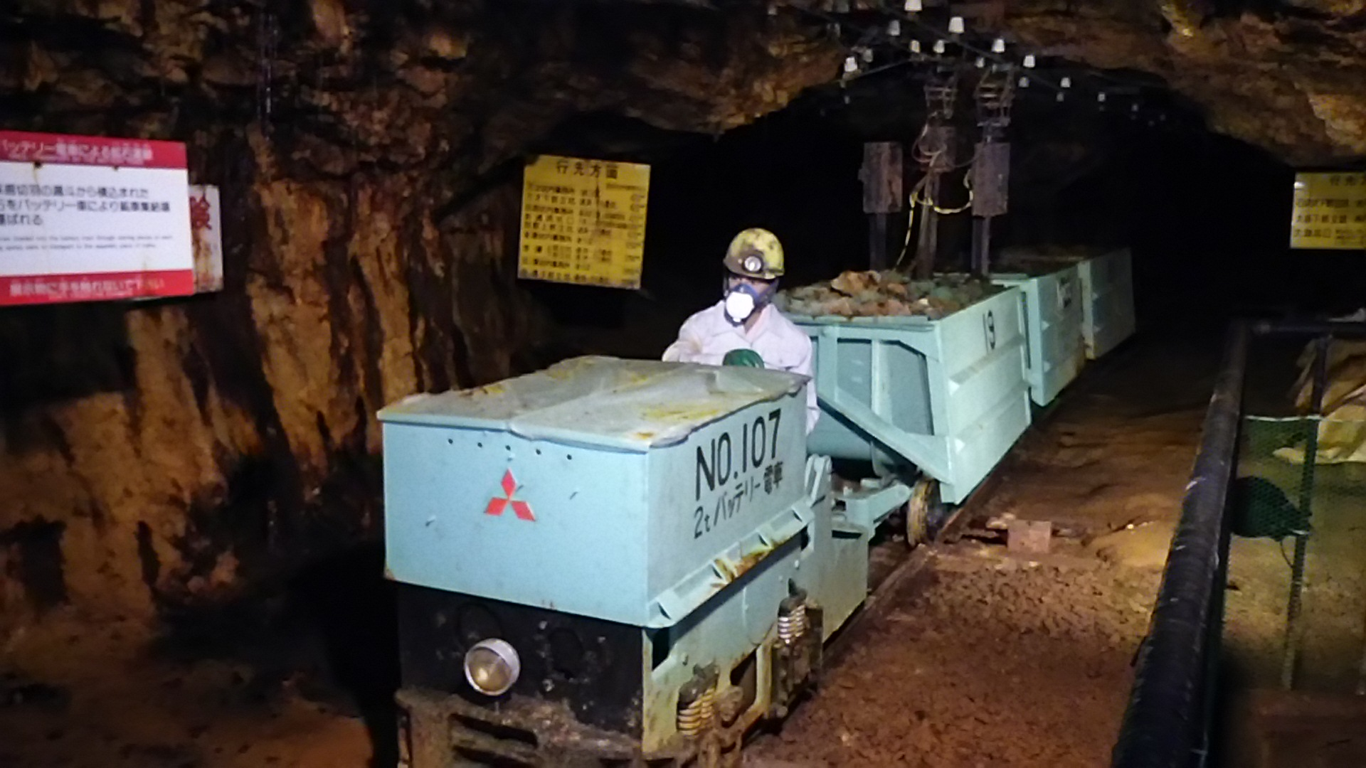 秋田県鹿角市の史跡尾去沢鉱山の展示施設